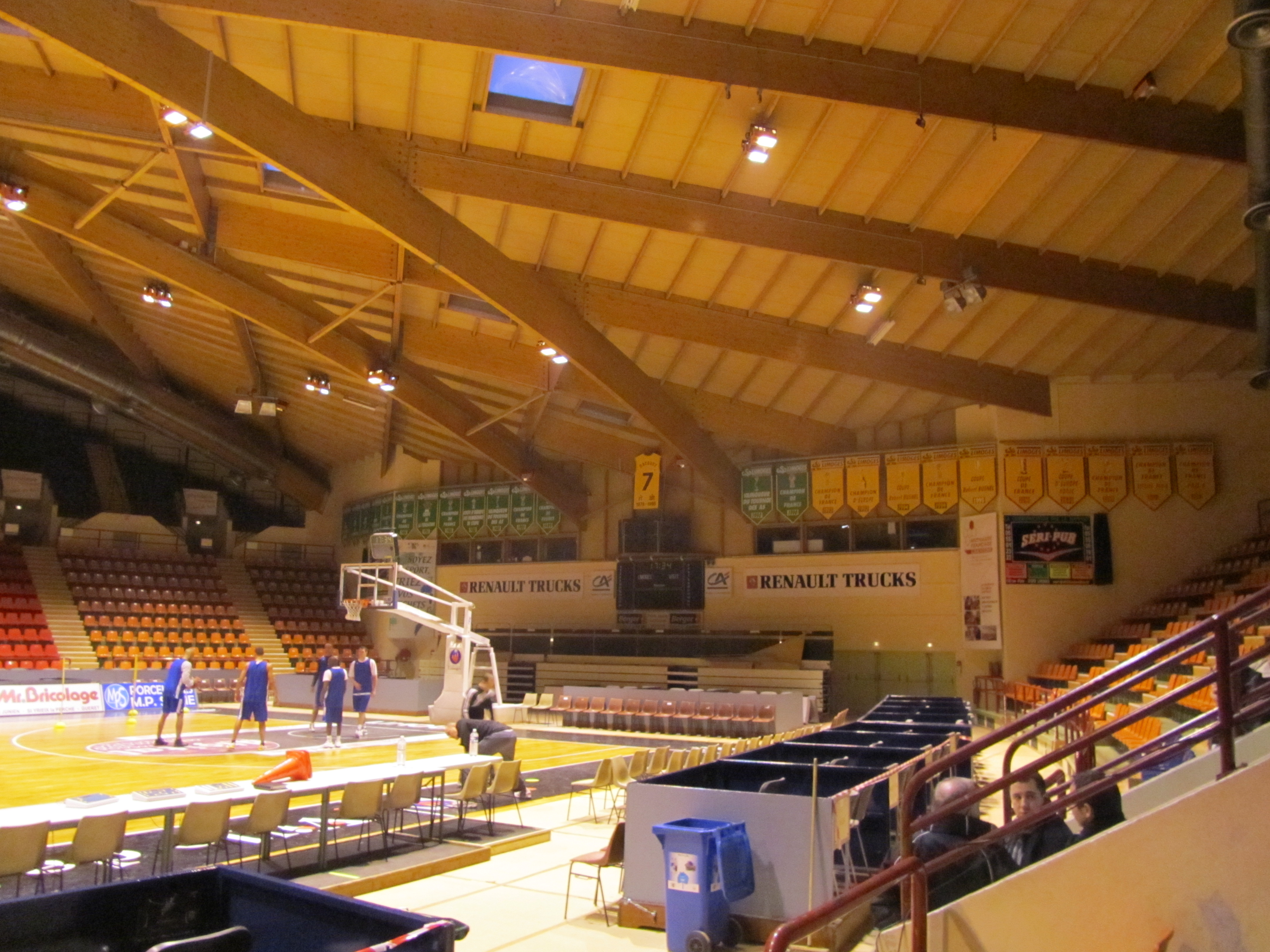 Les Bannières représentant tous les titres conquis par le club français de basket-ball Limoges CSP. Au centre, l'immense maillot n°7 représente le numéro porté par Richard Dacoury lors de son passage au club (1978-1996), le 7 est officiellement retiré au CSP.